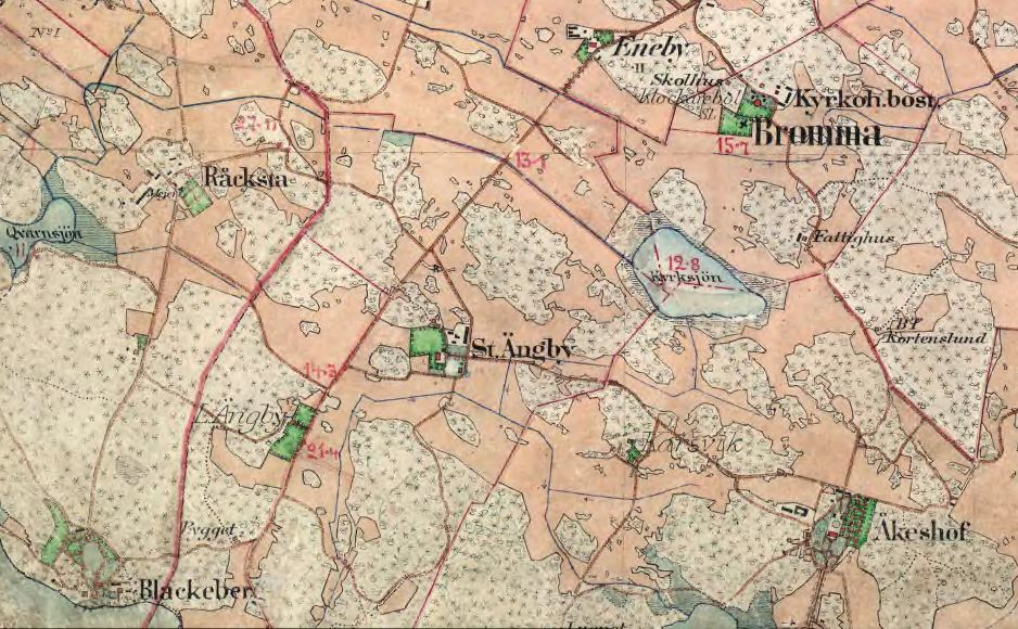 Lilla Ängby gård på Blackebergsvägen i Blackeberg i Bromma, väster om Stockholm. Den häradsekonomiska kartan visar gårdarnas läge i området vid 1900-talets början.